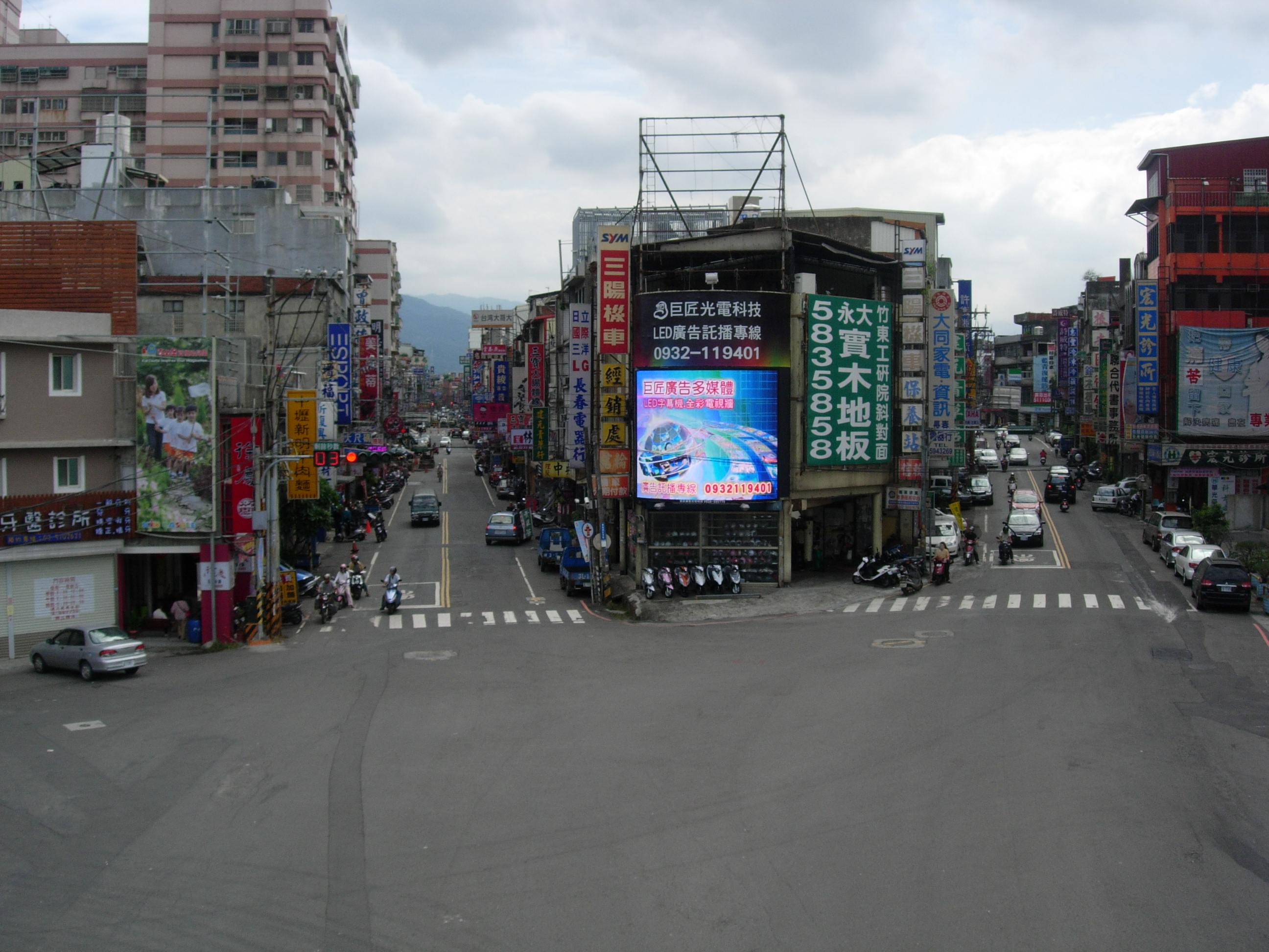 中文（台灣）: 竹東長春路東寧路口。